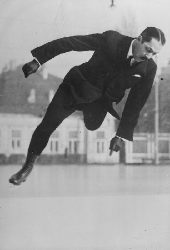 Meister des Schlittschuhes! Der ehemalige Weltmeister im Eiskunstlaufen Ing. Willi Böckl, Oesterreich, bei einem hervorragenden Schlittschuhsprung auf dem Eise.